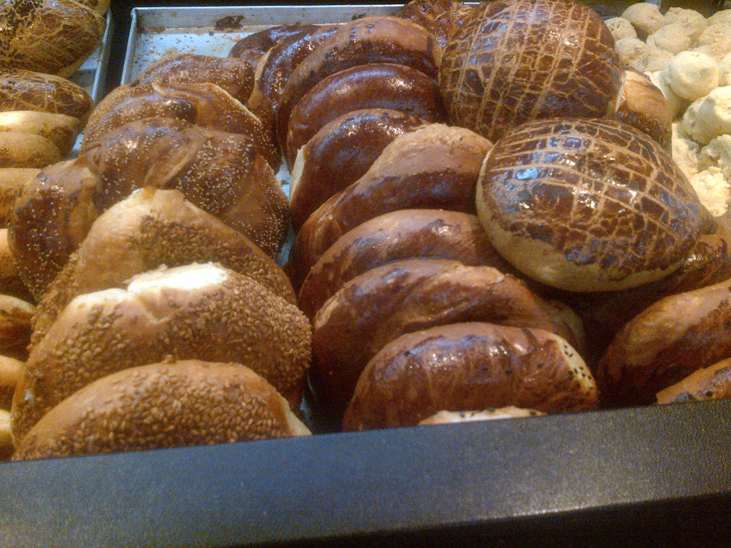 Variedades de "poğaça" (centro), kurabiye (derecha, al fondo) y "çörek" (izq al fondo), posiblemente también açma (con sésame) en una panaderia turca de Ankara.